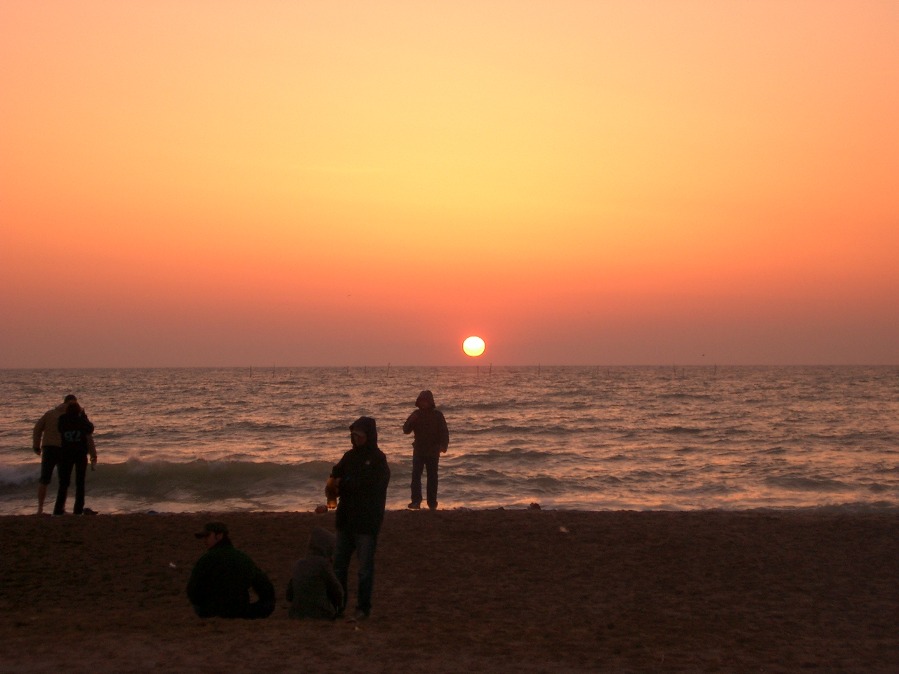 Lever de soleil à Vama Veche